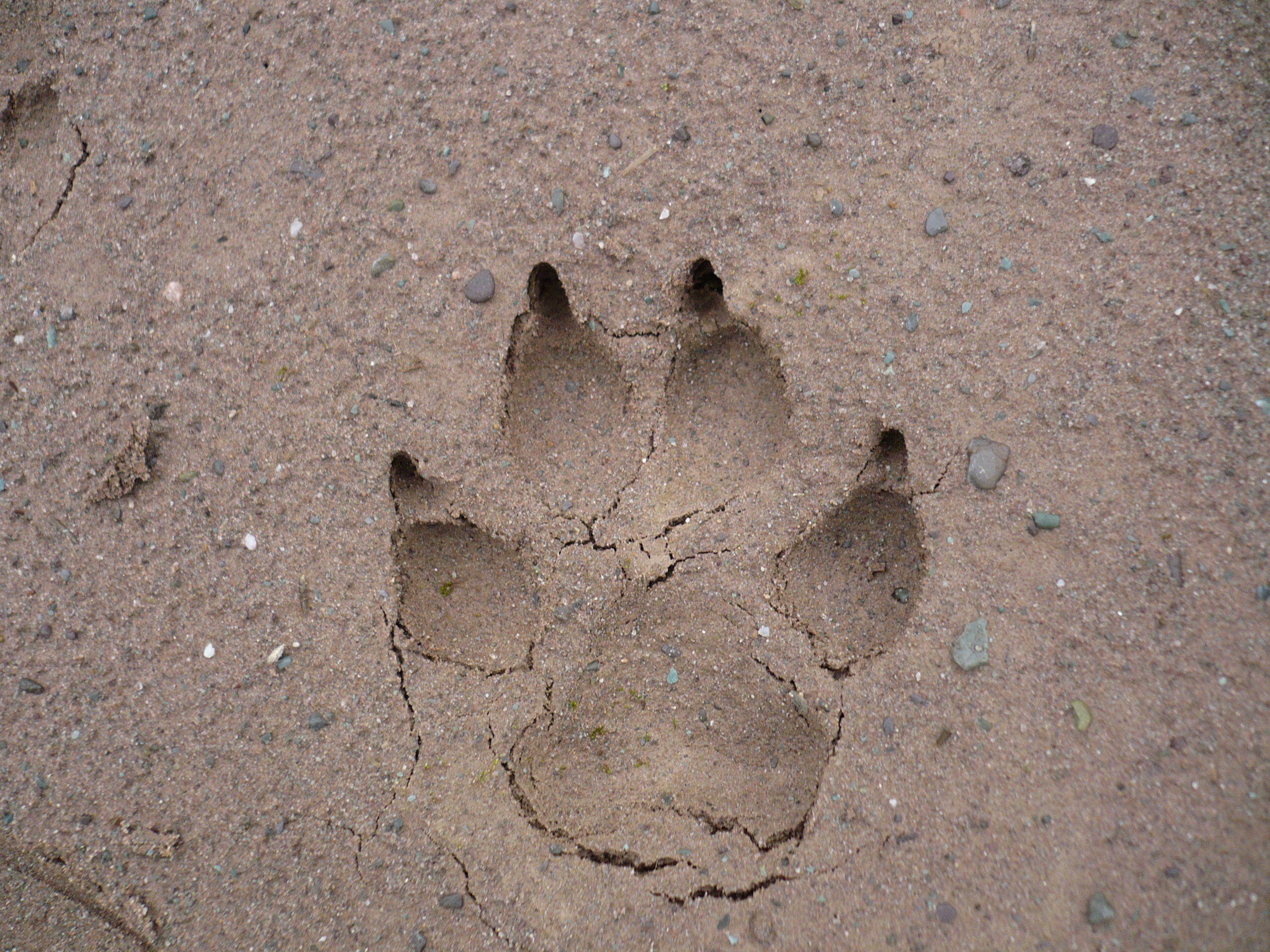 Una huella de un ¿perro? en la arena